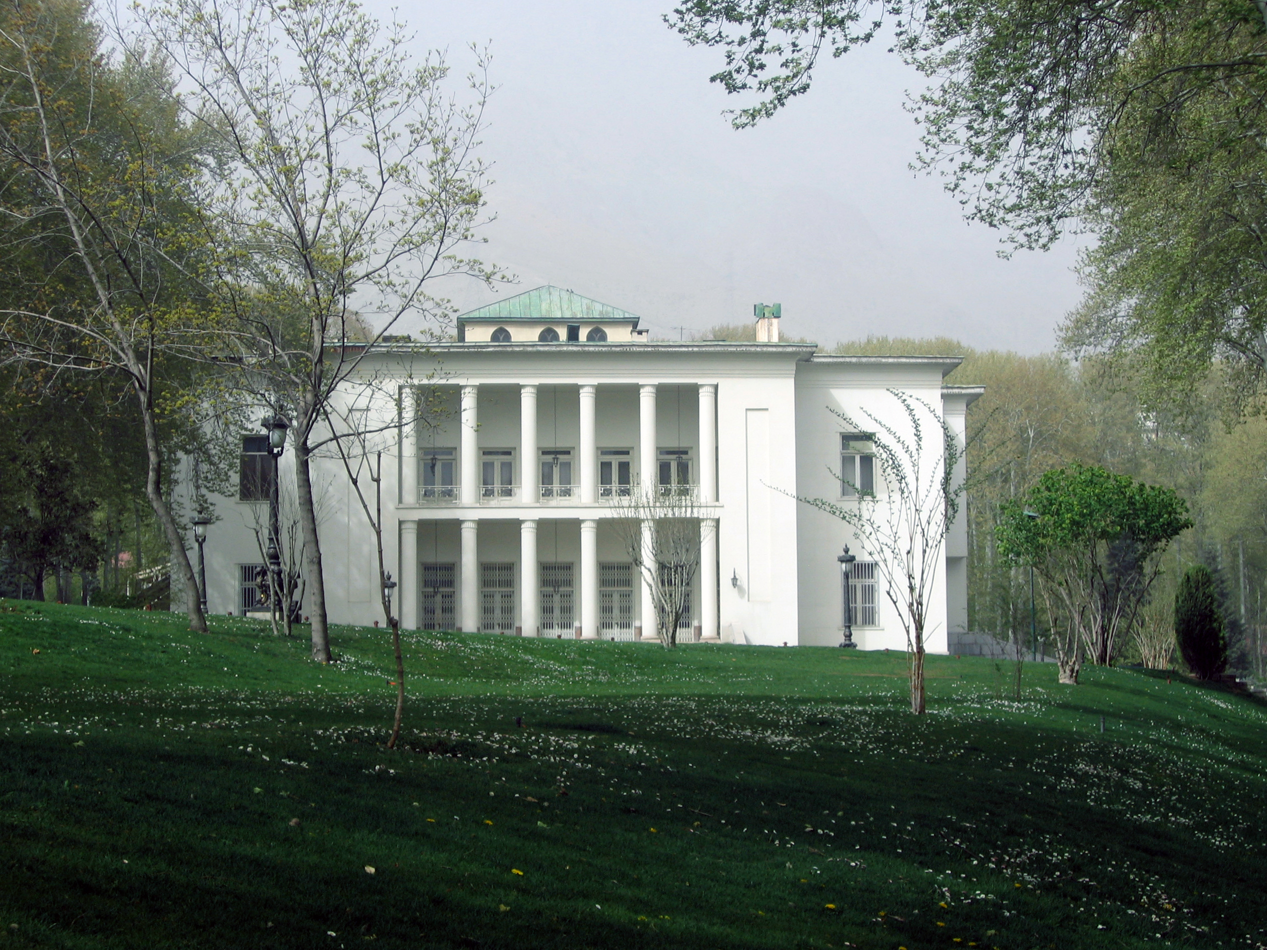 نمایی از کاخ سفید در مجموعه سعدآباد